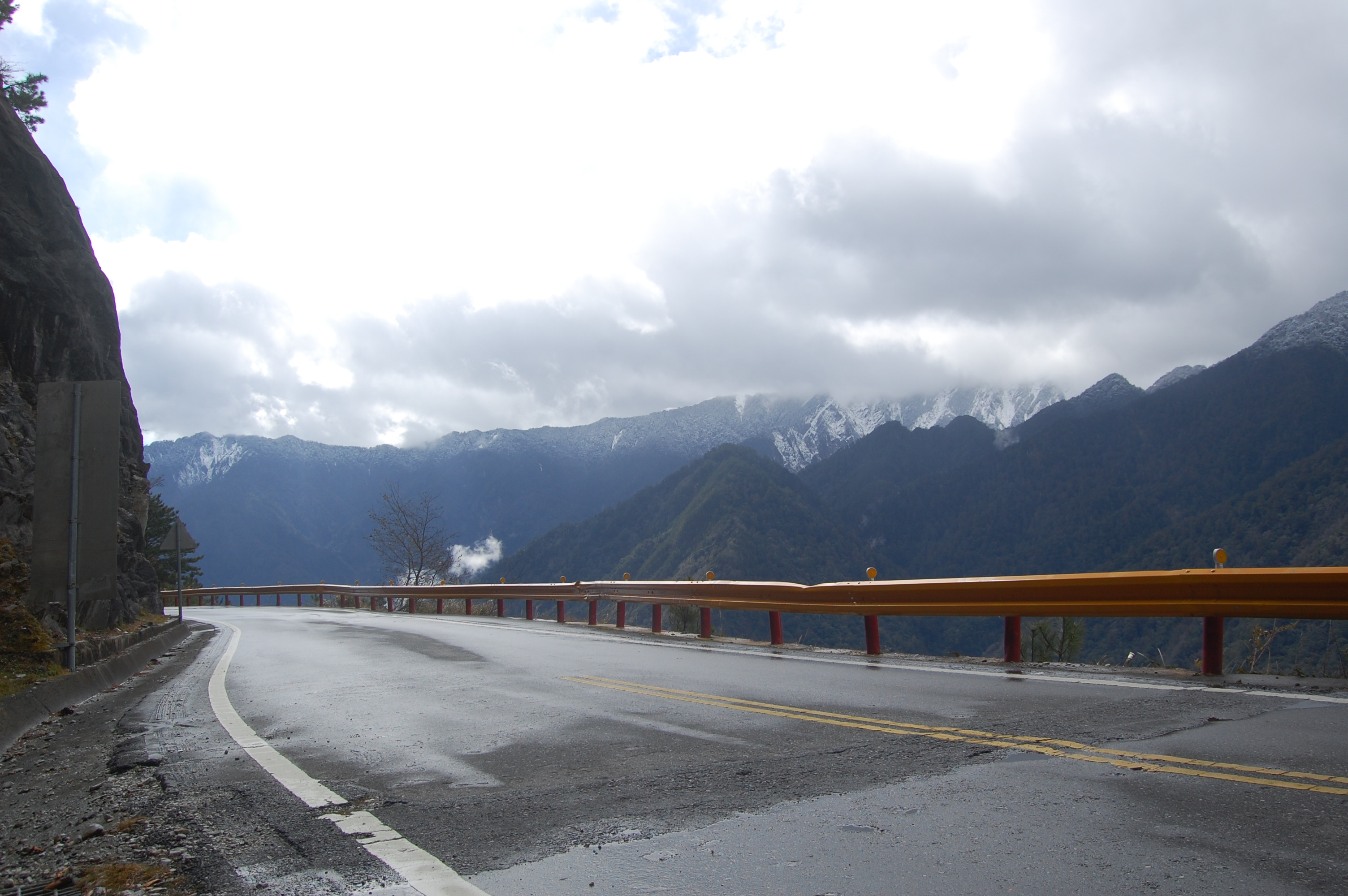 Along Highway in Hehuanshan